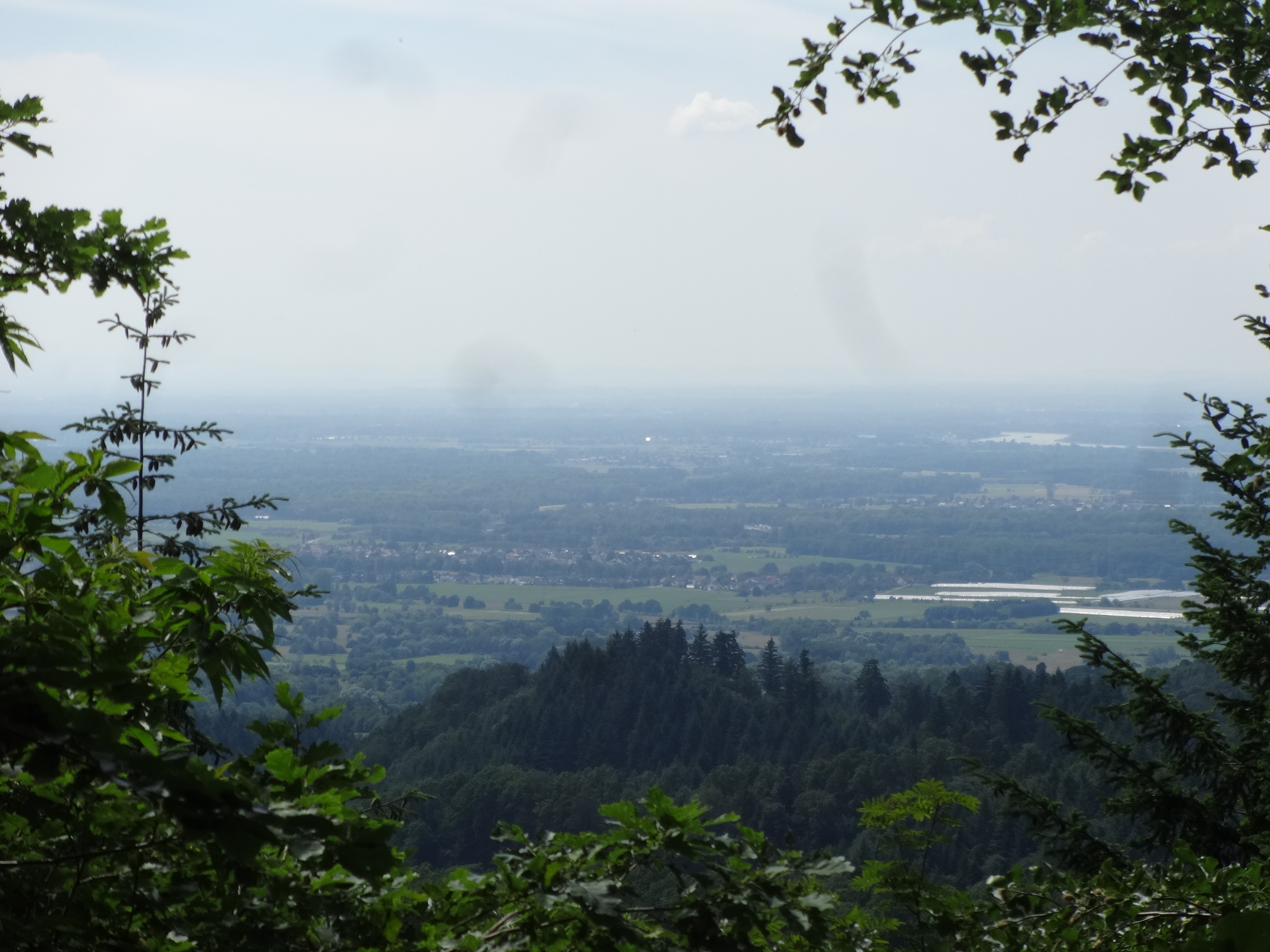 Der Panoramaweg Baden-Baden ist ein rund 40 Kilometer langer Wanderweg, der um die Stadt Baden-Baden führt. Er wurde 1997 neugestaltet und 2004 vom Deutschen Tourismusverband als „schönster Wanderweg“ ausgezeichnet.